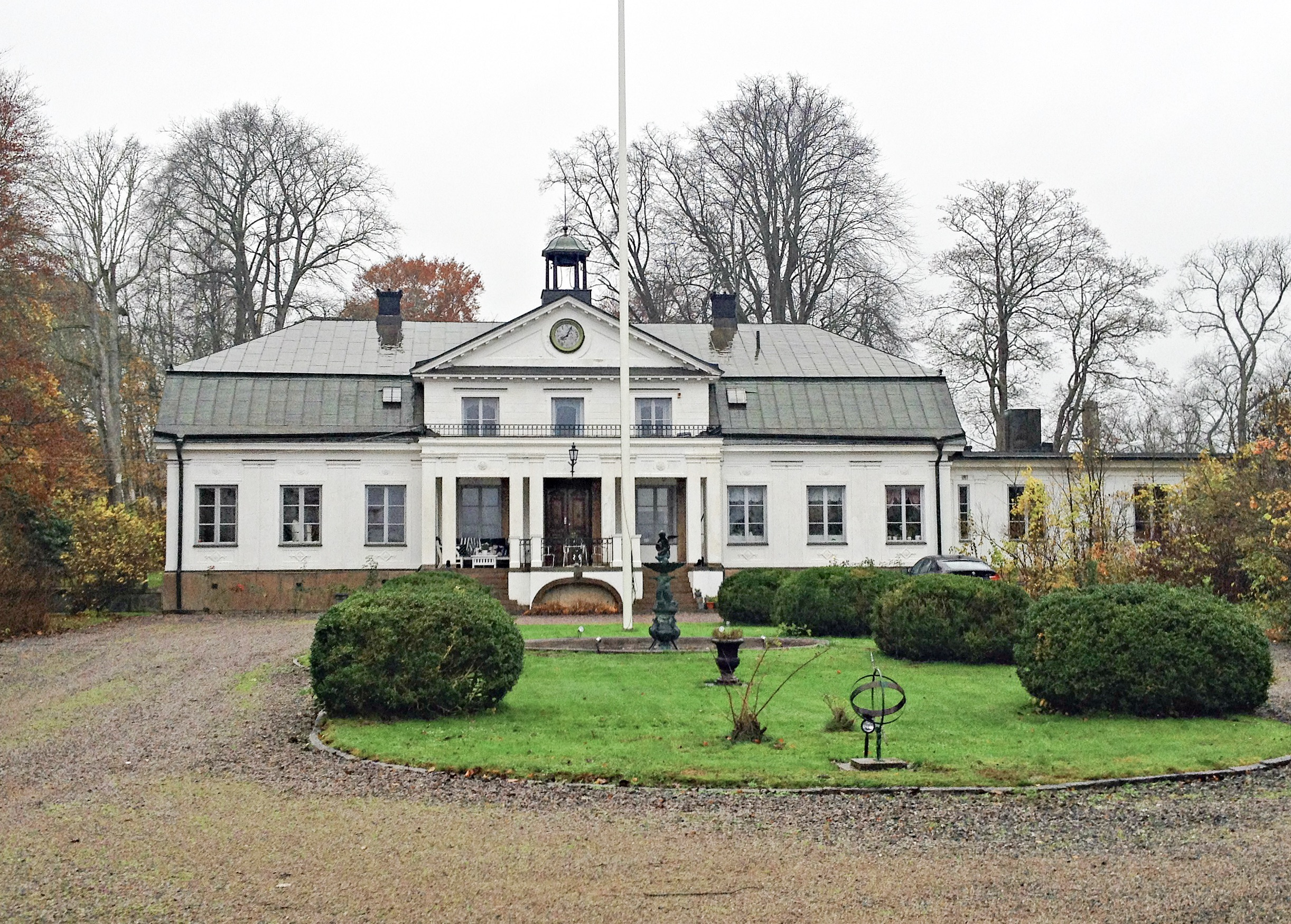 Bruksherrgården i Överum, VÄSTERVIK ÖVERUM 1:266 - husnr 1. (BeBR 21400000417809)